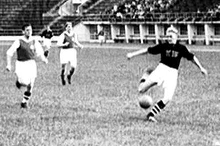 Jalkapallo-ottelu KIF-Ilves-Kissat Helsingin olympiastadionilla vuonna 1951.